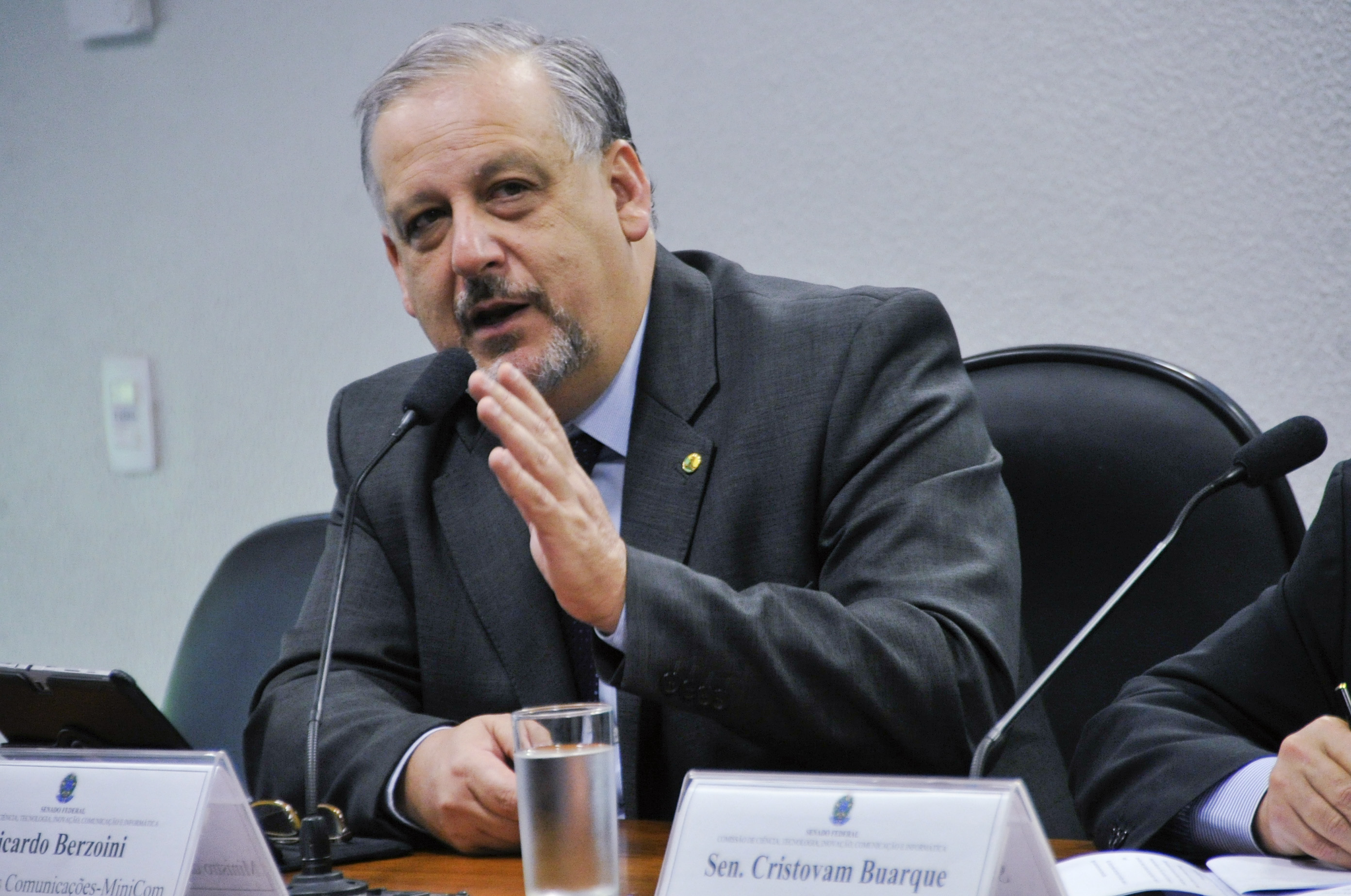 Audiência pública interativa com o ministro das Comunicações, Ricardo Berzoini, para debater a agenda e prioridades do ministério para o biênio 2015/2016. Em pronunciamento, o ministro das Comunicações, Ricardo Berzoini. Foto: Geraldo Magela/Agência Senado